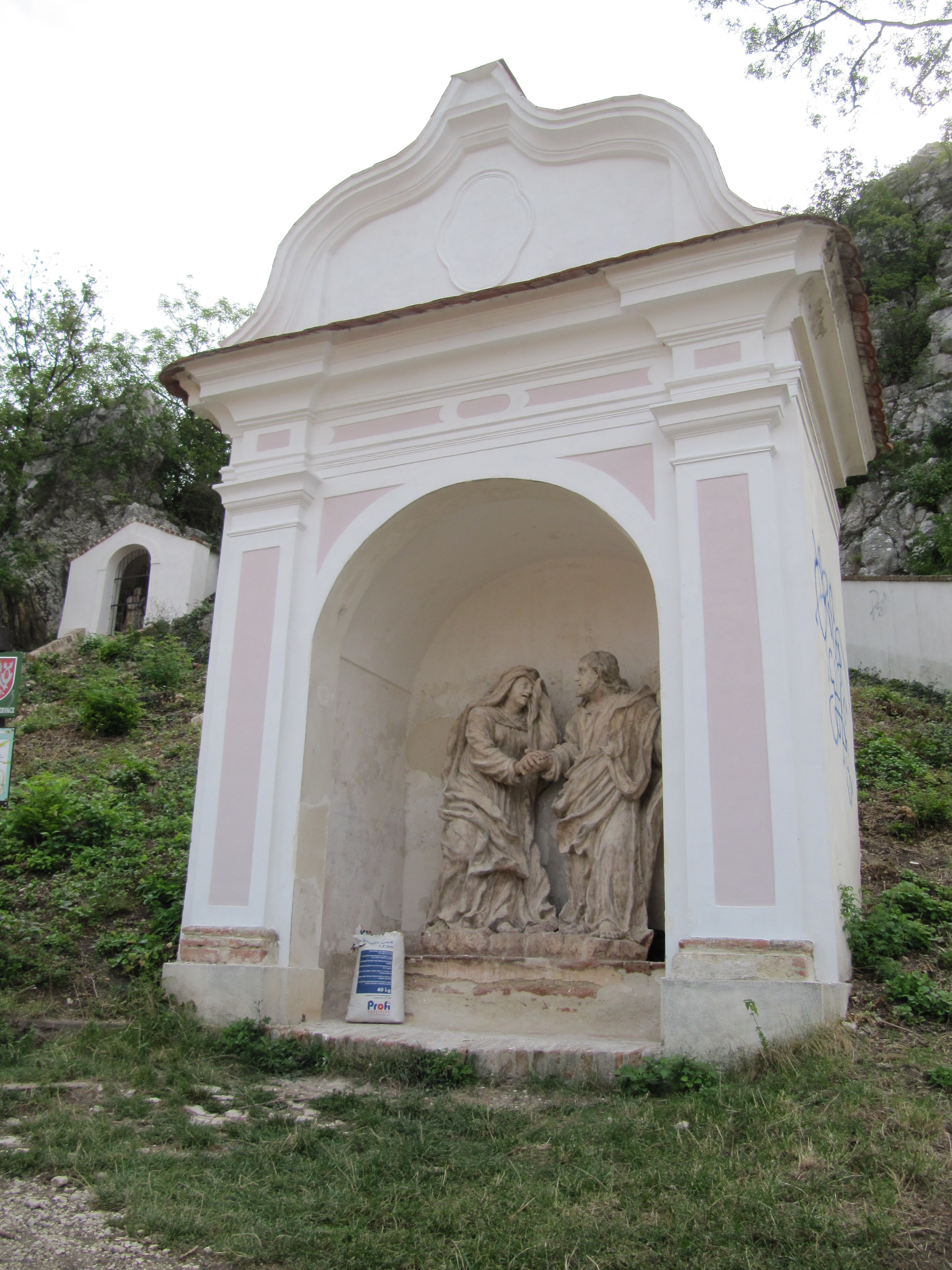 Křížová cesta a kaple Božího hrobu (Mikulov), na Kopečku, Mikulov